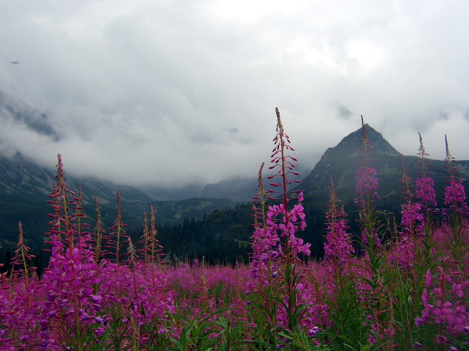 Hala Gąsienicowa-Chamaenerion angustifolium